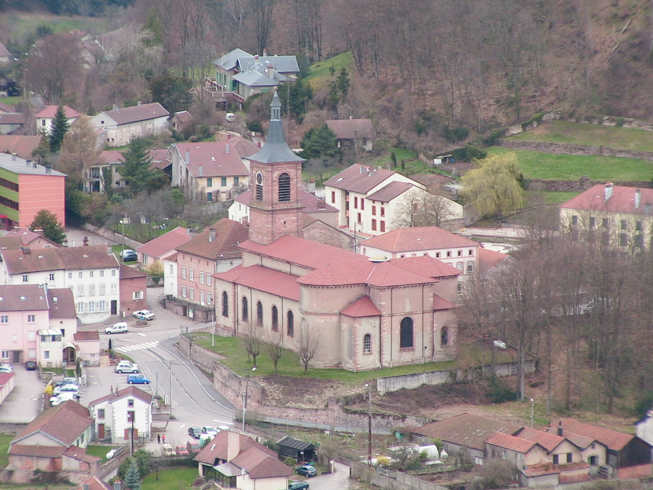 Eglise de Bruyère (88) vue de l'Avison Photo prise le 15 avril 2006 par F5ZV